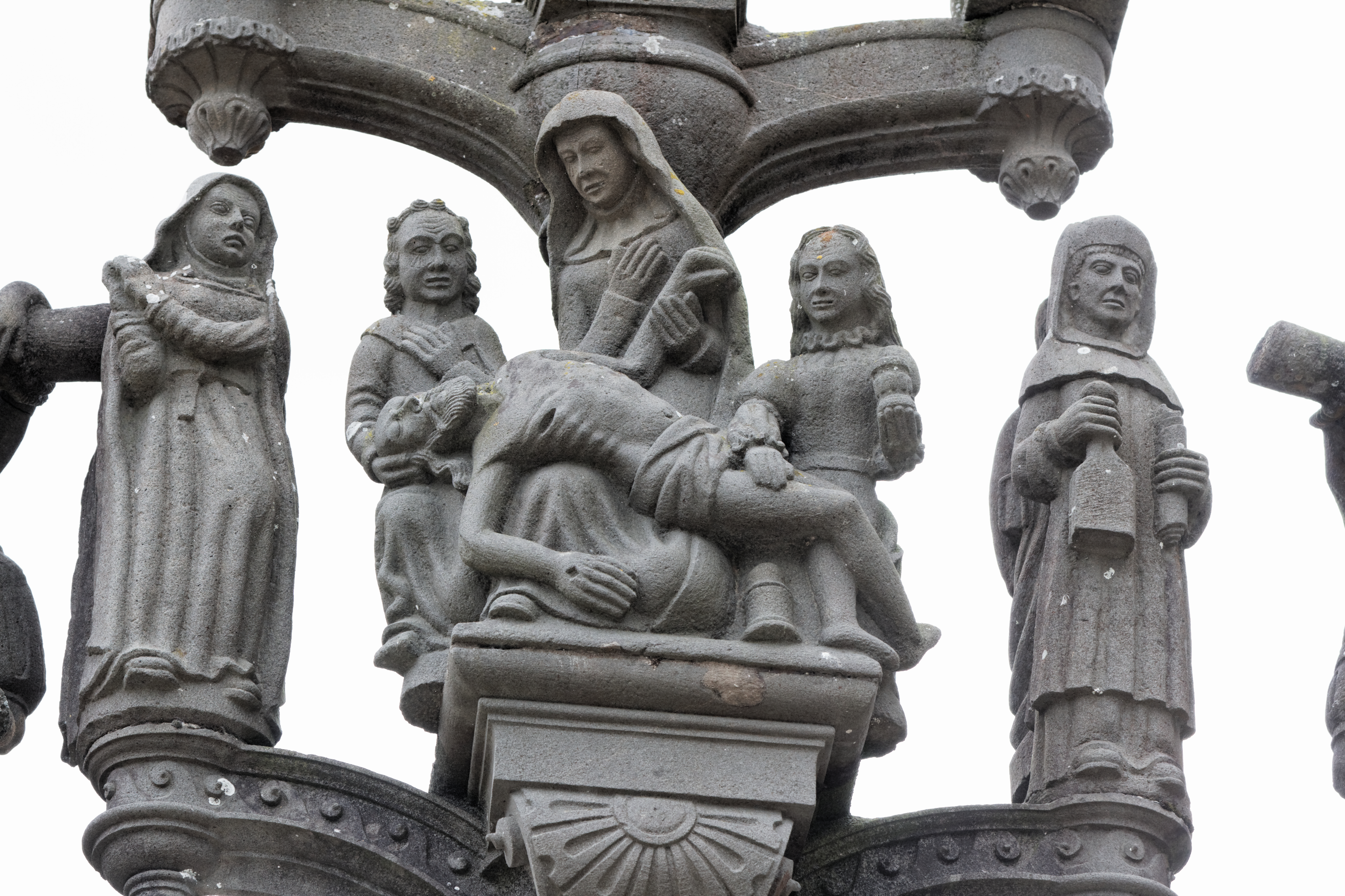 L'enclos paroissial de Saint Thegonnec dans le Finistère.